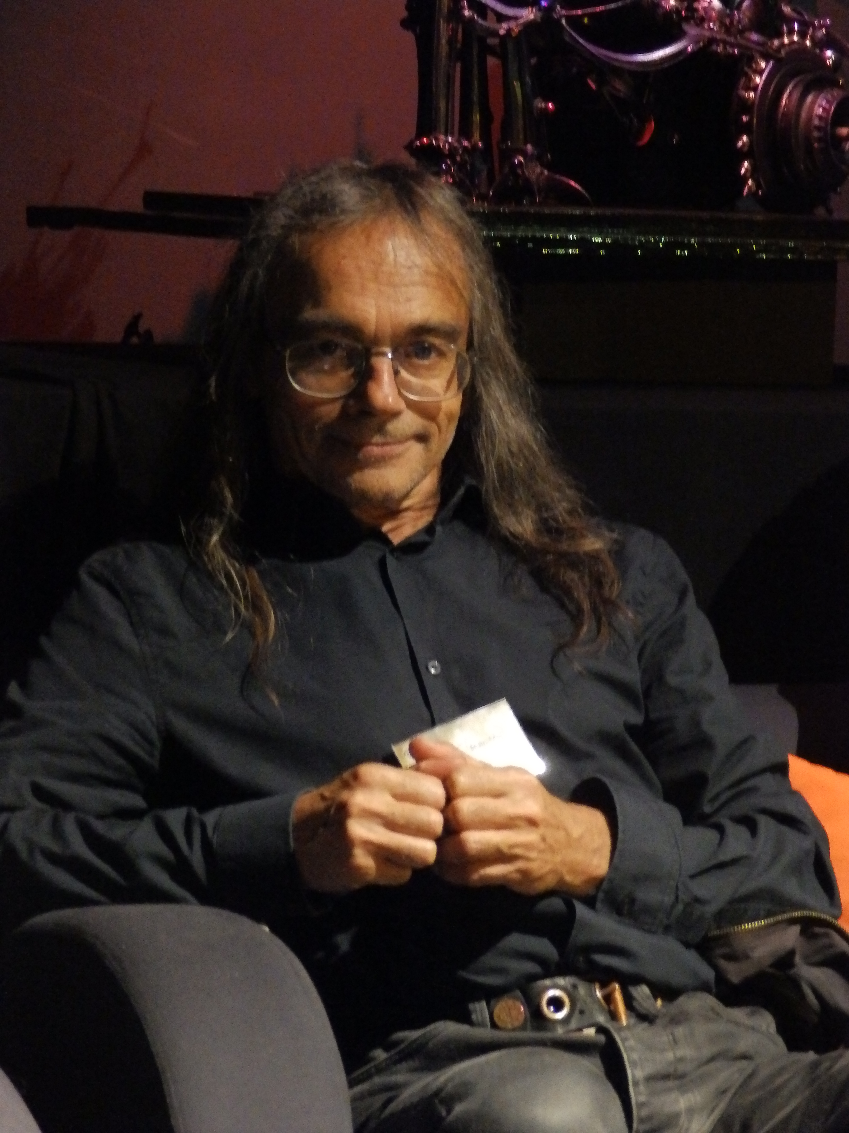 L'écrivain français de science-fiction Jean-Marc Ligny lors du 16e festival des mondes imaginaires Les Imaginales à Epinal en mai 2017